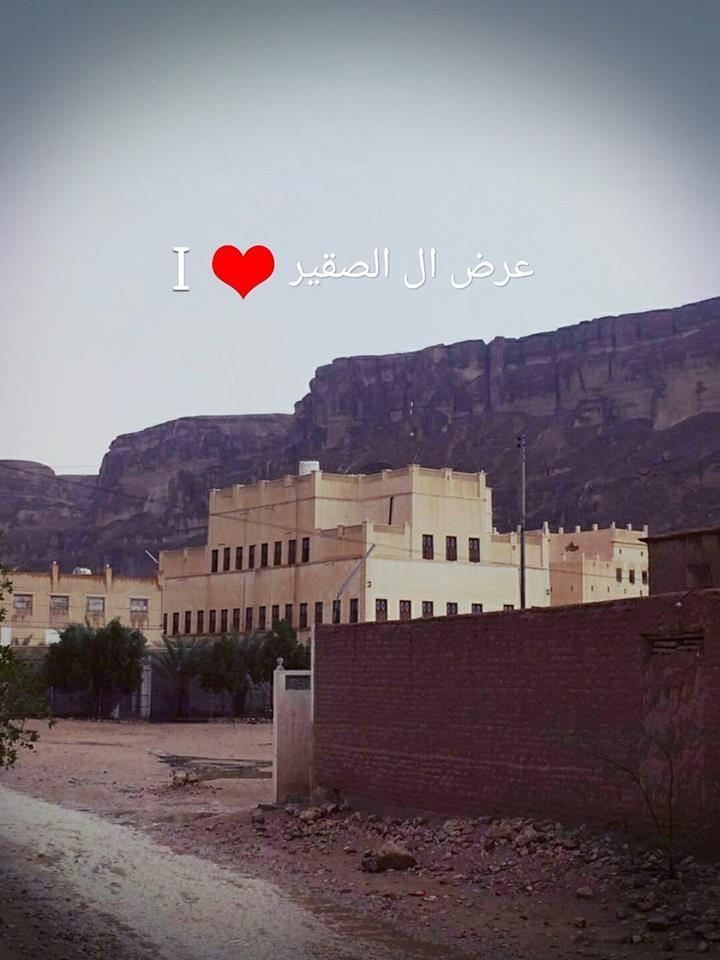 صورة التقطها لـ مسقط راسي عرض ال الصقير